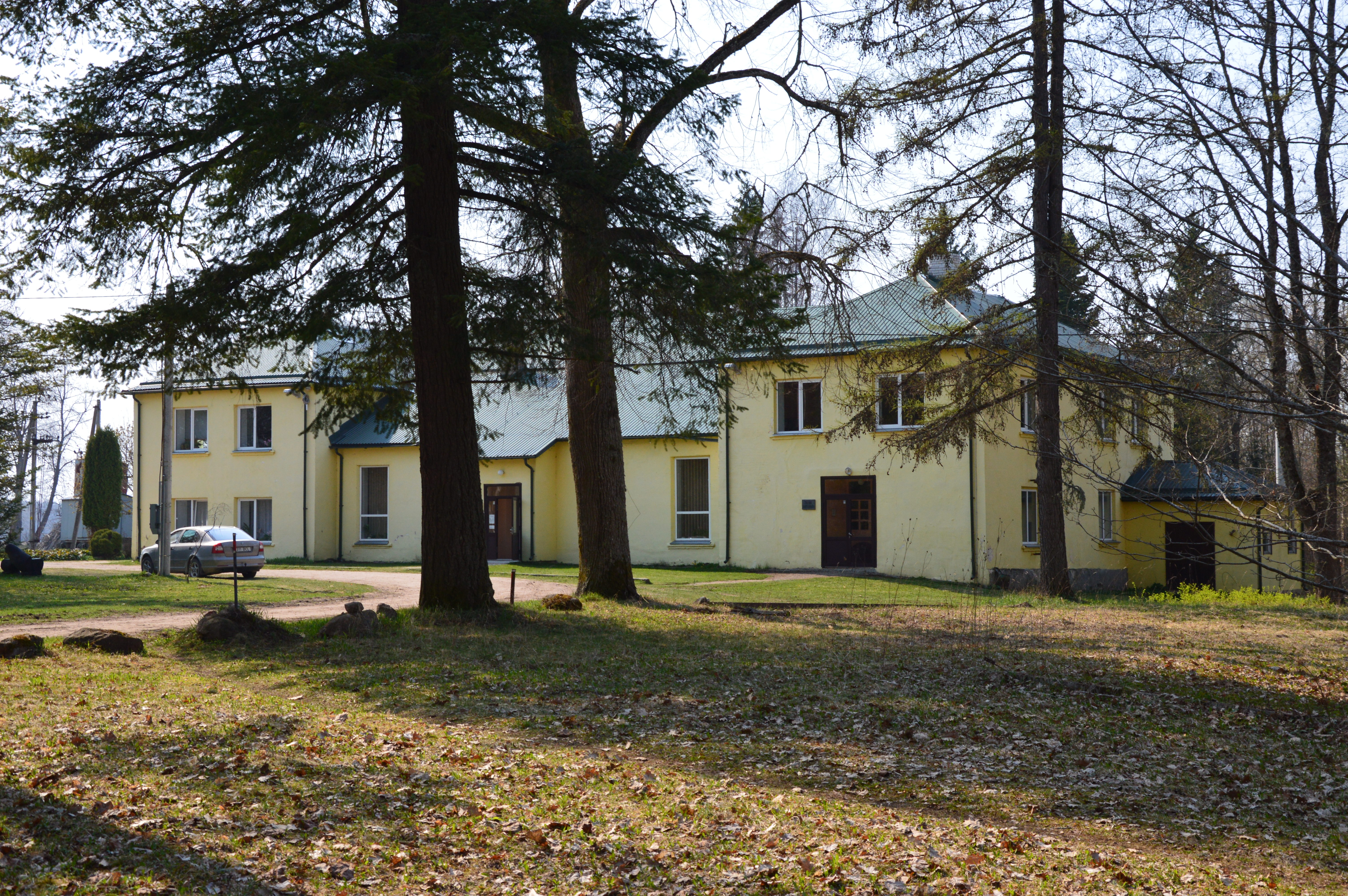 Tsooru raamatukogu